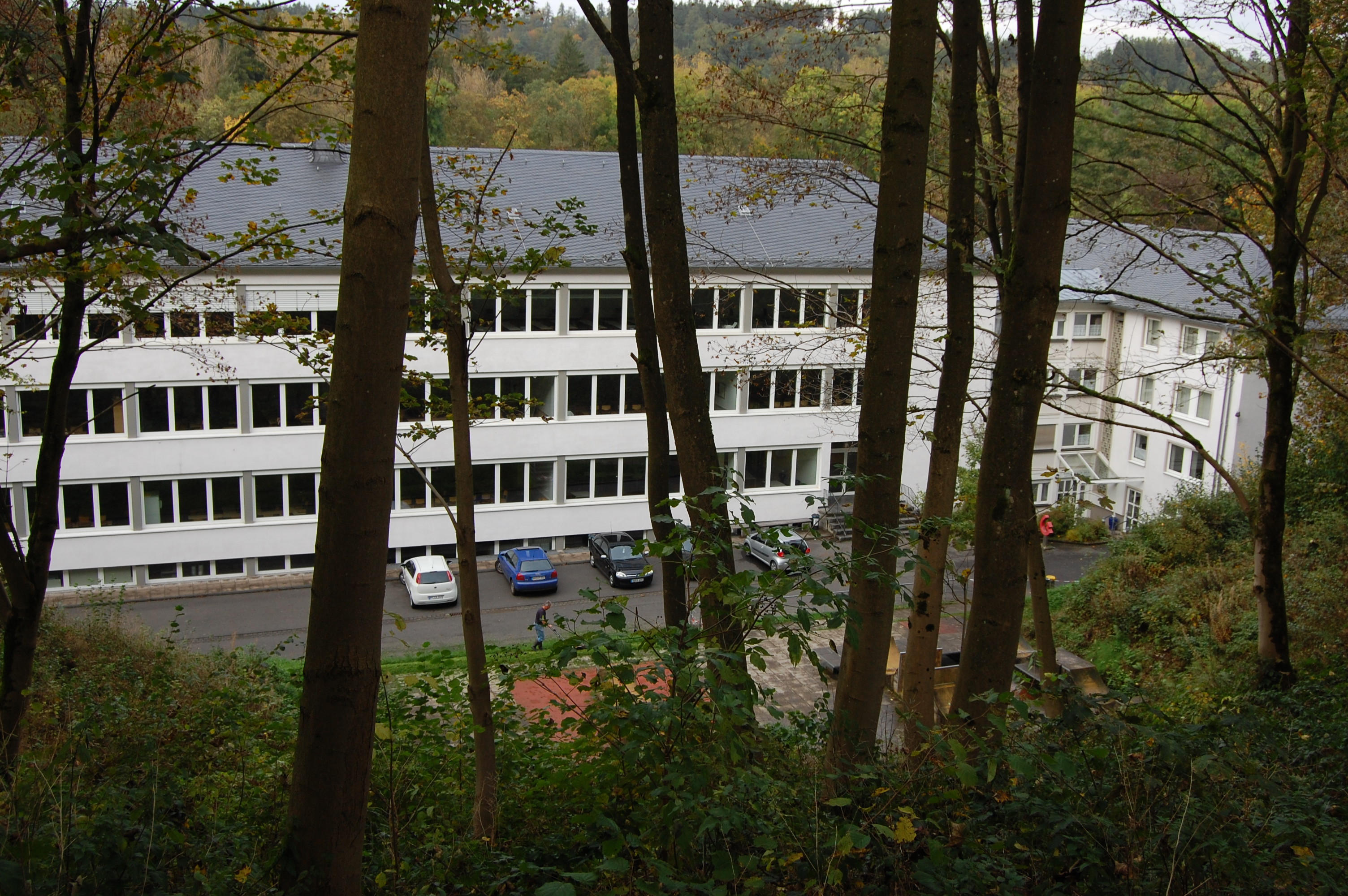 Gymnasium Marienstatt: Der Klassen- oder B-Trakt, von der Höhe des Parkplatzes aus gesehen.